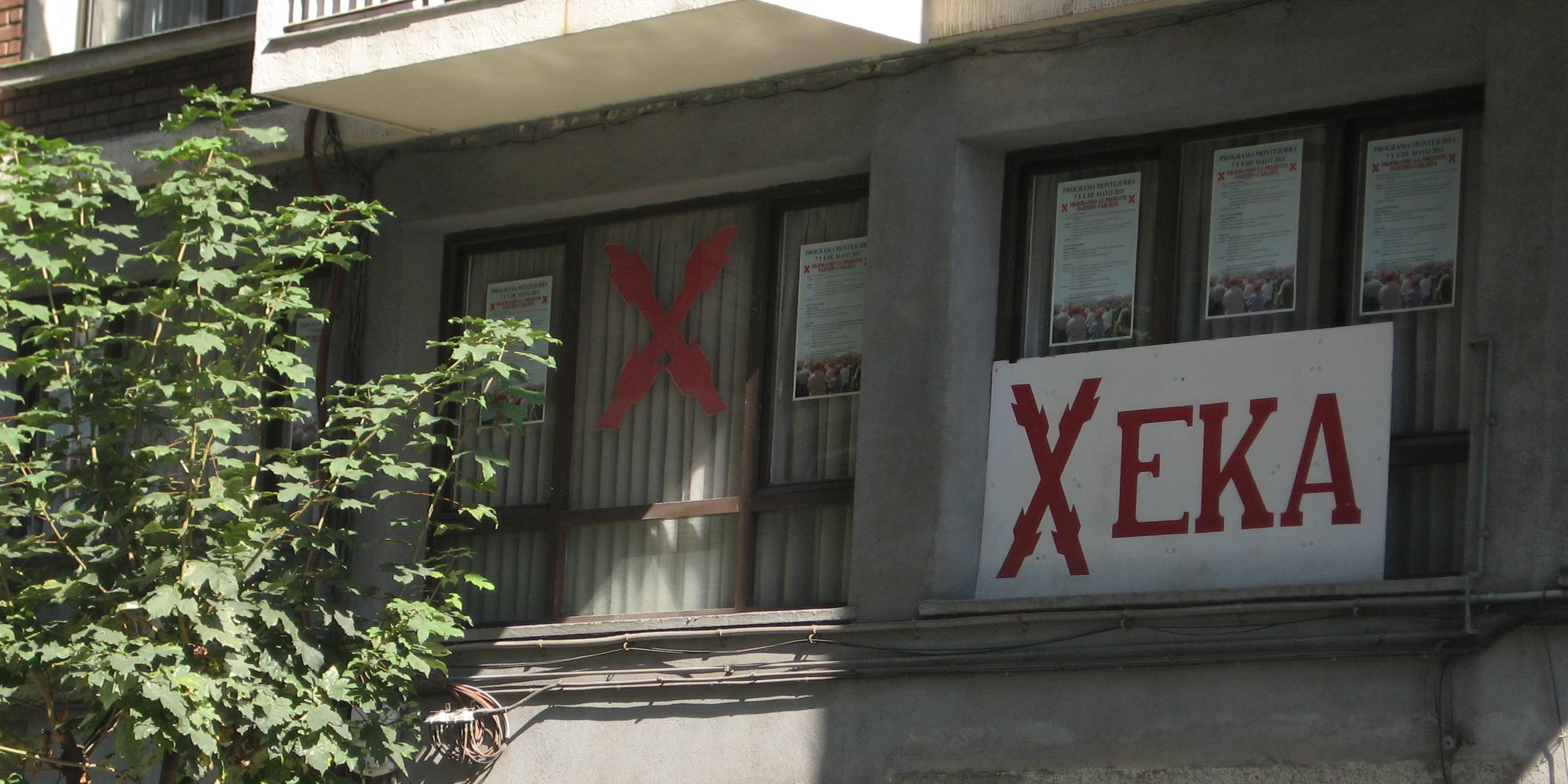 Sede del Partido Carlista en la calle Santa Clara de Santutxu, Bilbao.